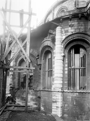 Eglise : Abside